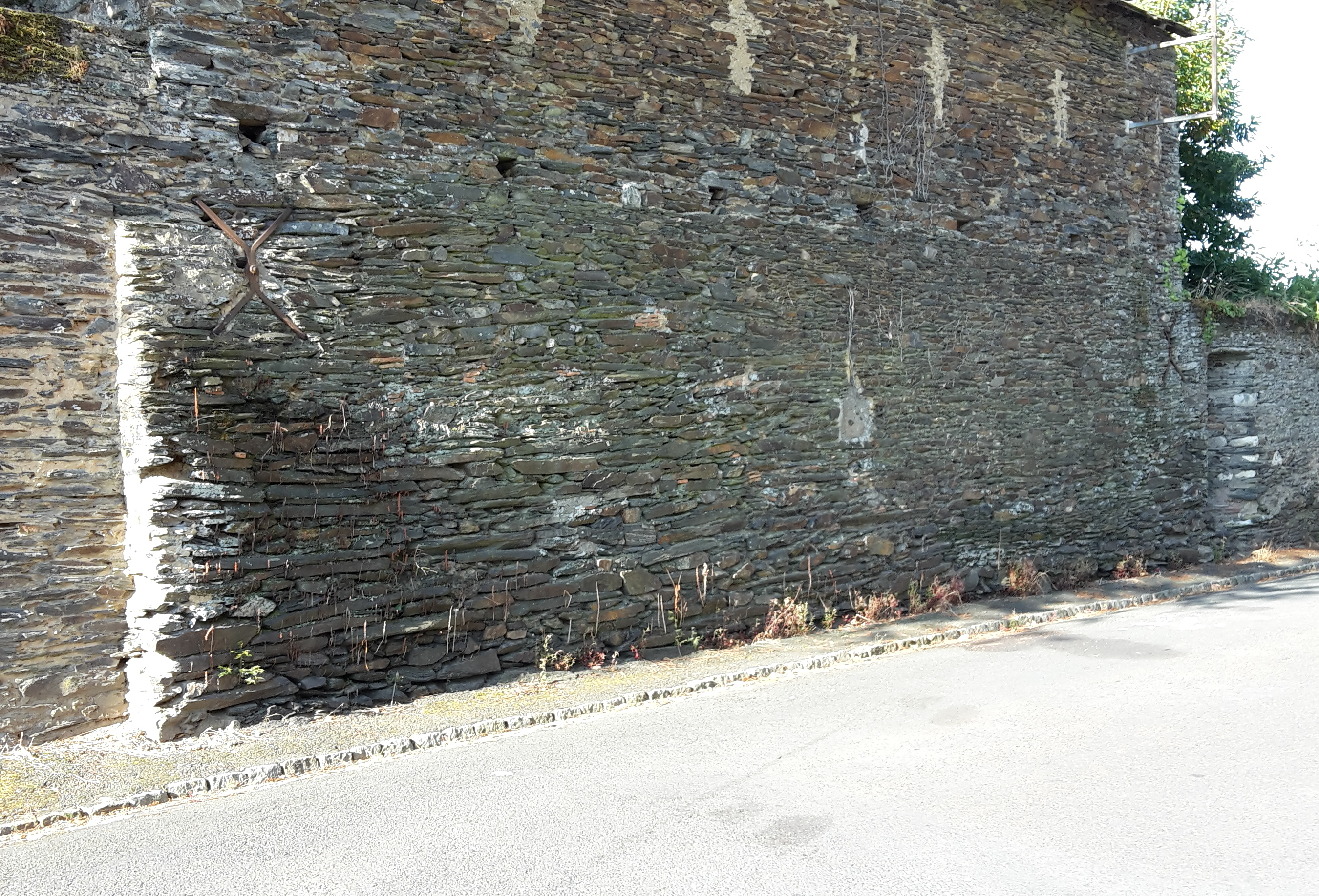 Restes hypothétiques du donjon médiéval de Candé, Maine-et-Loire, France.